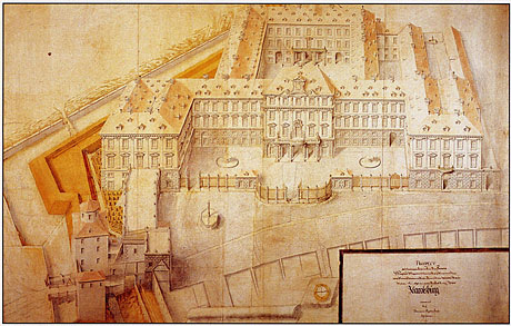 Schloss Durlach (Karlsburg). Lithographie von P. Wagner, nach dem Idealplan von D. E. Rossi 1698. Generallandesarchiv, Karlsruhe (Inv. HfK, Bd. XXVIII, Nr. 6). Friedrich VII. Magnus (1647-1709) ließ sich 1698 von dem in Rastatt tätigen Architekten Rossi ein neues Schloss für Durlach entwerfen. Wegen der neuerlichen Kriegshandlungen seit 1701 wurde allerdings nur ein Flügel fertiggestellt.